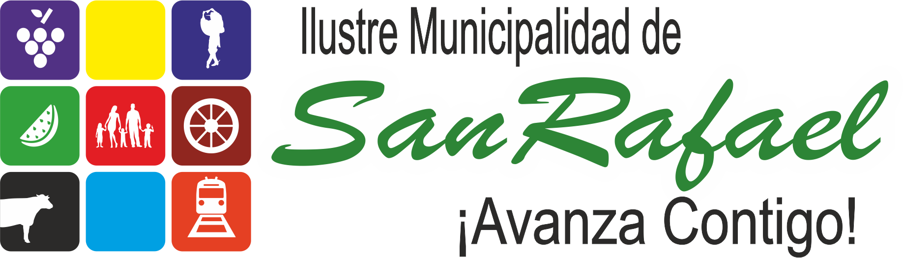 Logo de la Municipalidad de San Rafael.